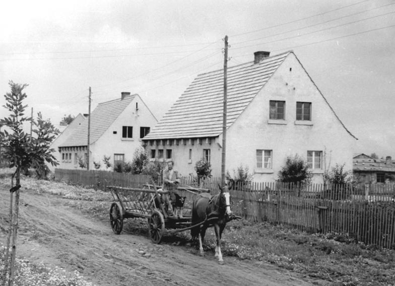 Sachsendorf, Blick auf Wohnhäuser Zentralbild Krueger Me-Sch.-10.8.1955 Sachsendorf 1955 (siehe Begleittext) 1955, nach Beendigung des Krieges, gab es in ganz Sachsendorf kein Haus, in welchem nicht der Himmel durchs Dach schaute. Heute zählt das Dorf über 150 festgefügte Neubauten. Jedes eine Heimstatt der Friedensliebe und neuen Daseinsfreude.